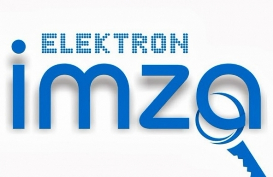 Elektron İmza